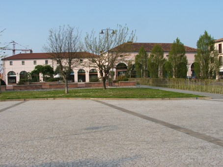 autore:groucho85 fonte:groucho85 descrizione: Villadose, Piazza Barchessa licenza d'uso: pubblico dominio note: foto scattata da me, groucho85, per wikipedia